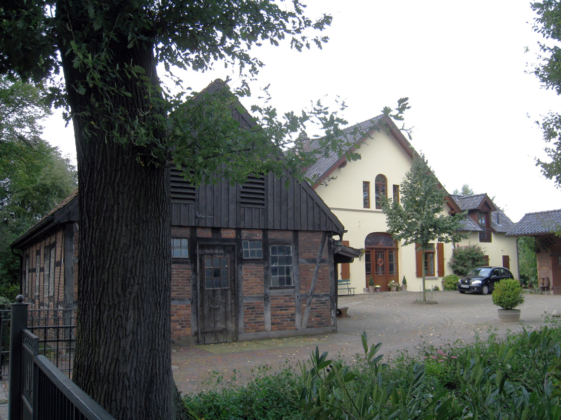 Schmiede Oberneuland und Wohnhaus in Bremen, Oberneulander Heerstraße 72.Die Denkmalgruppe ist ein geschütztes Kulturdenkmal in der Freien Hansestadt Bremen, mit der Nr. 1042 beim Landesamt für Denkmalpflege registriert.